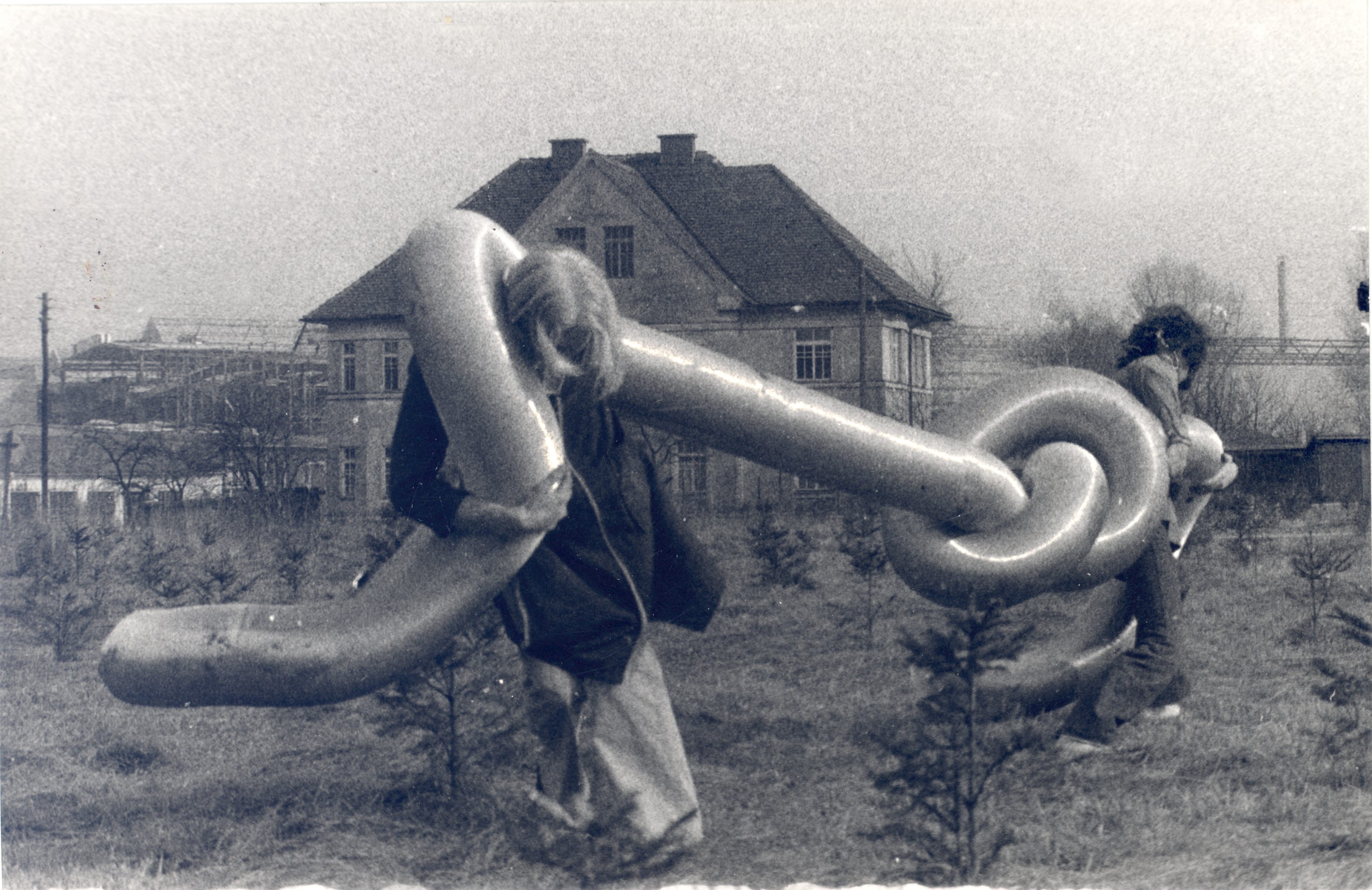 Aluminium/Lüftungsschlauch, Dimension ca. 6m